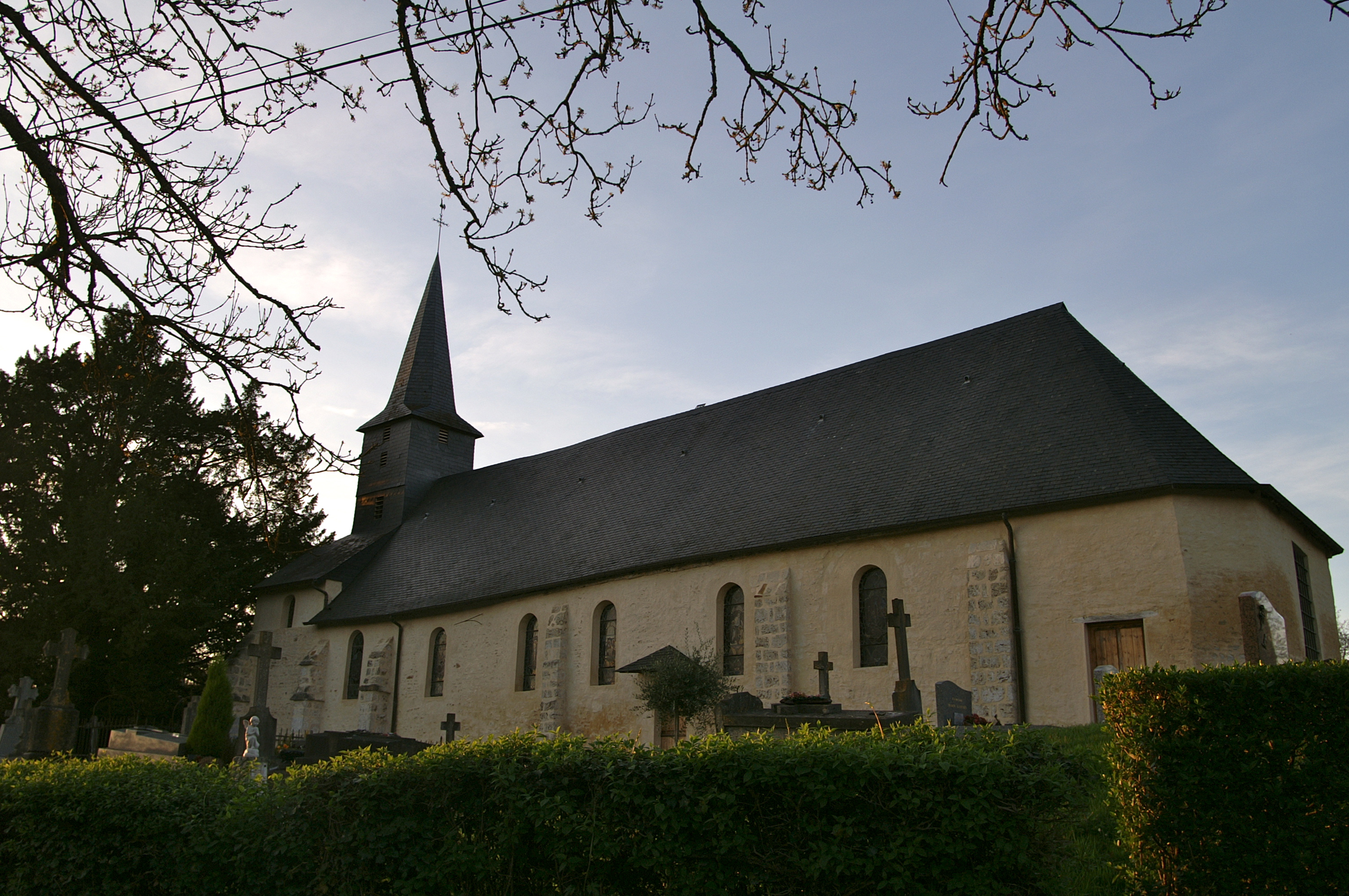 Église de Tourville-en-Auge.